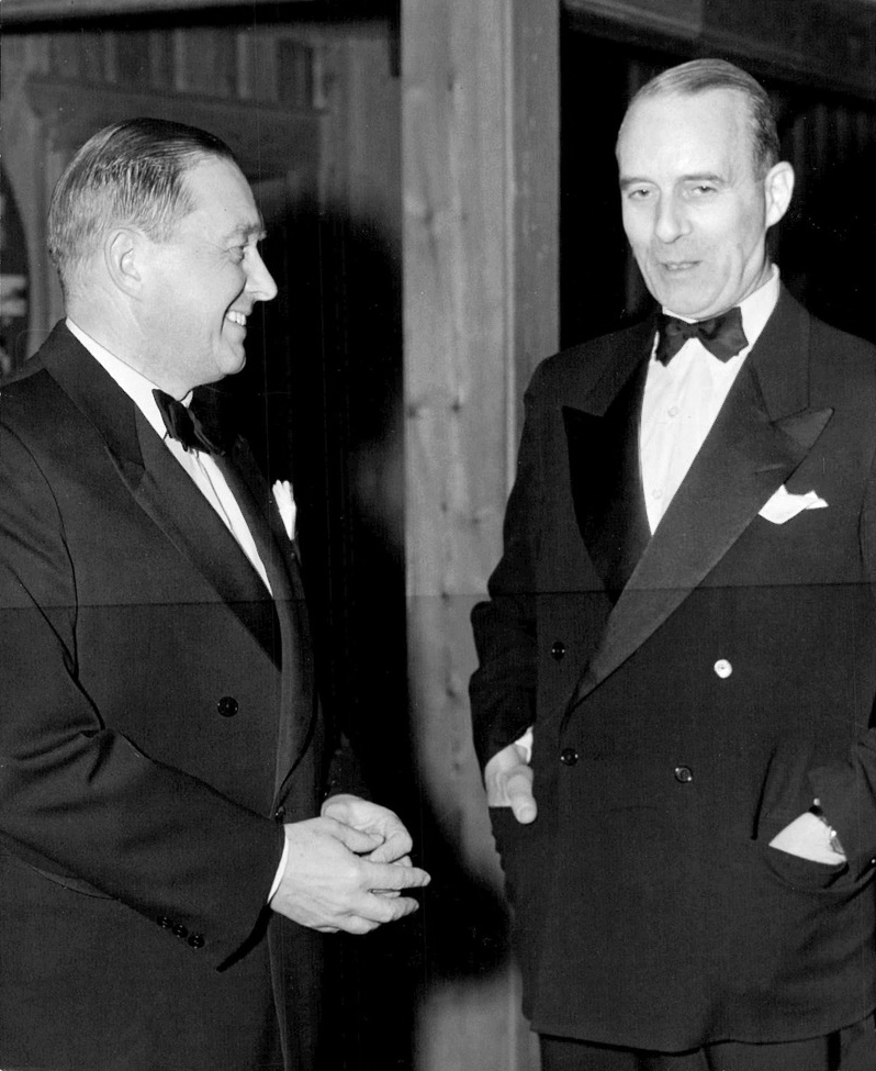 Den danska föreningens ordförande, direktör Viggo Andersen, i samspråk med den avgående ambassadören Nils Svenningsen.Den danska föreningen i Stockholm högtidlighöll på lördagskvällen vid en sammankomst på Högloftet kung Frederik IX:s födelsedag och tog samtidigt avsked av det danska ambassadörsparet, som den 1 april lämnar Stockholm och flyttar till Paris. Föreningens ordförande, direktör Viggo Andersen, erinrade i sitt tal för ...